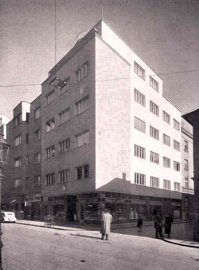 Milovan Kovačević- Stambena zgrada, Petrinjska 47, Zagreb 1933.